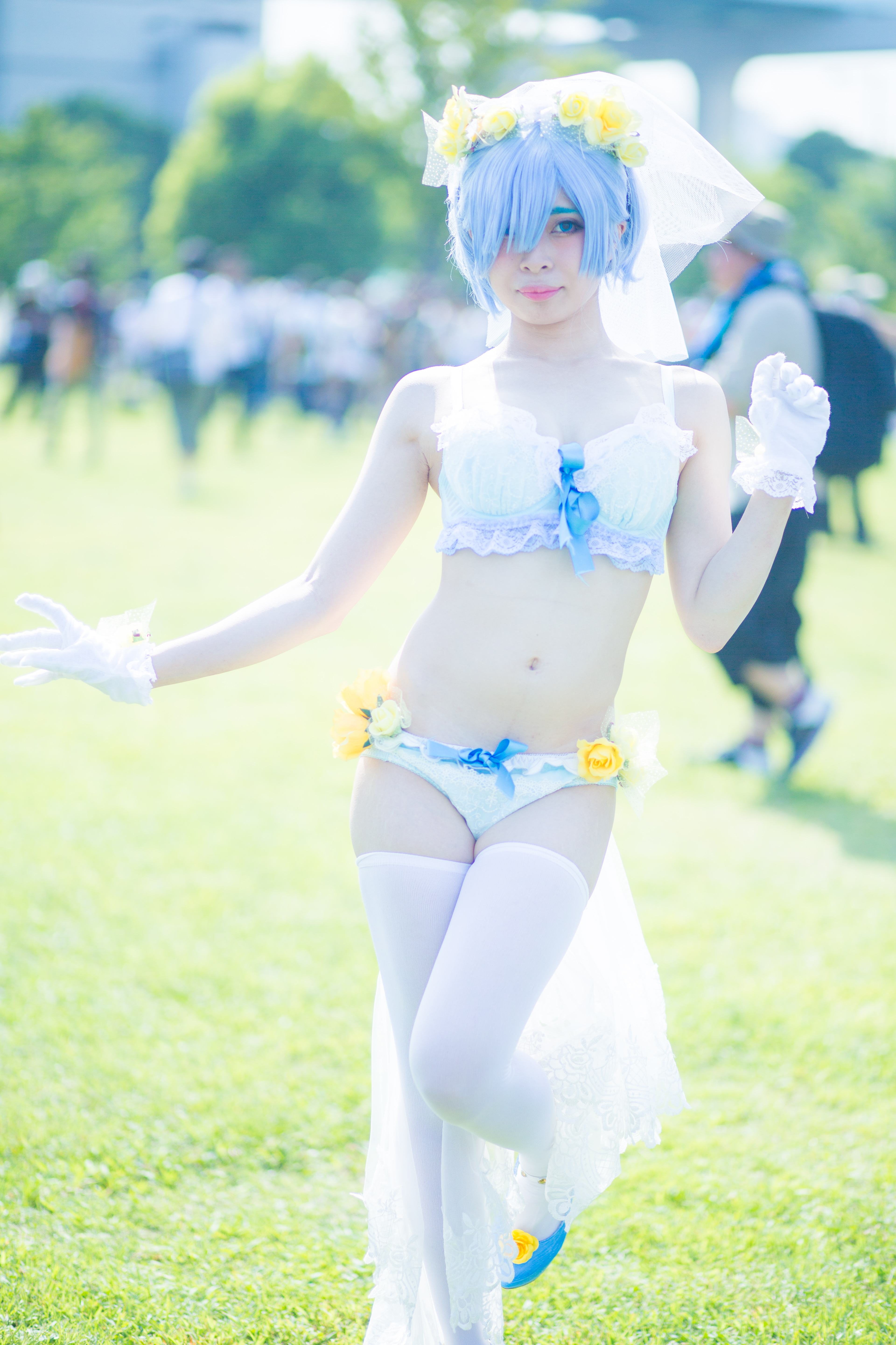 Comic Market 94第一日，婚紗《Re:從零開始的異世界生活》雷姆cosplayer。